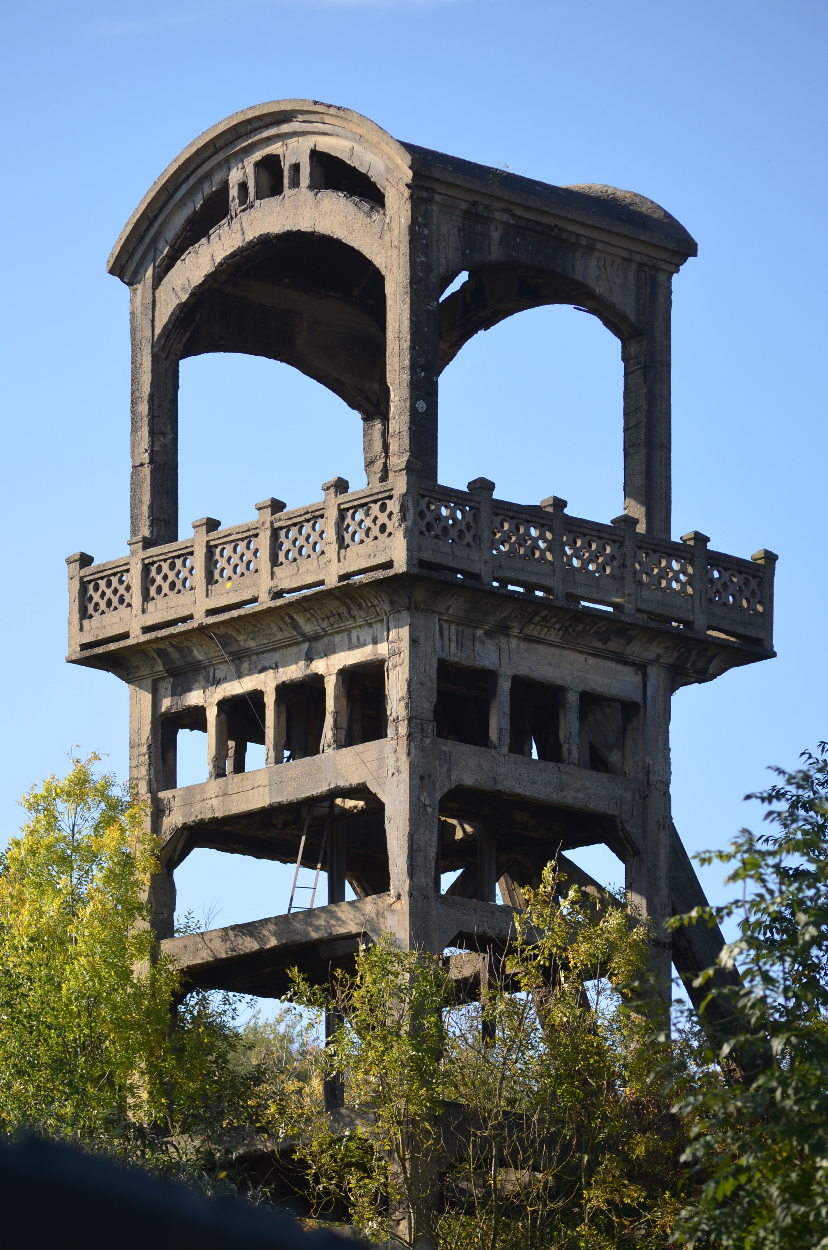 Monceau-sur-Sambre (Charleroi-Belgique) - Chevalement de mine en béton armé servant à l'exhaure du siège n° 3 des Charbonnages de Monceau Fontaine. Construction remontant aux années 1920.